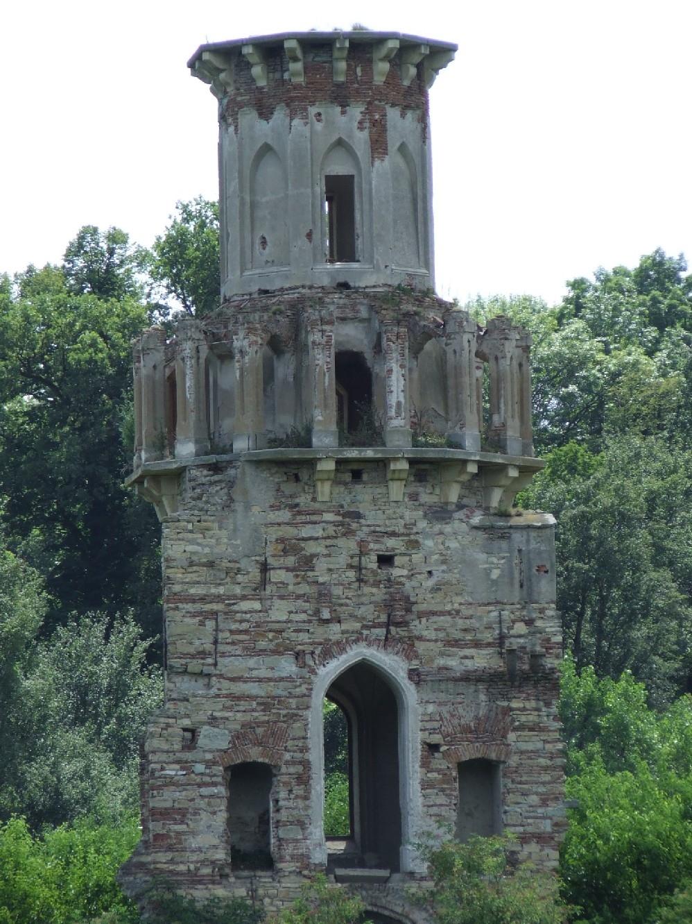 Teleki Castle in Luna de Jos, Cluj County, Romania